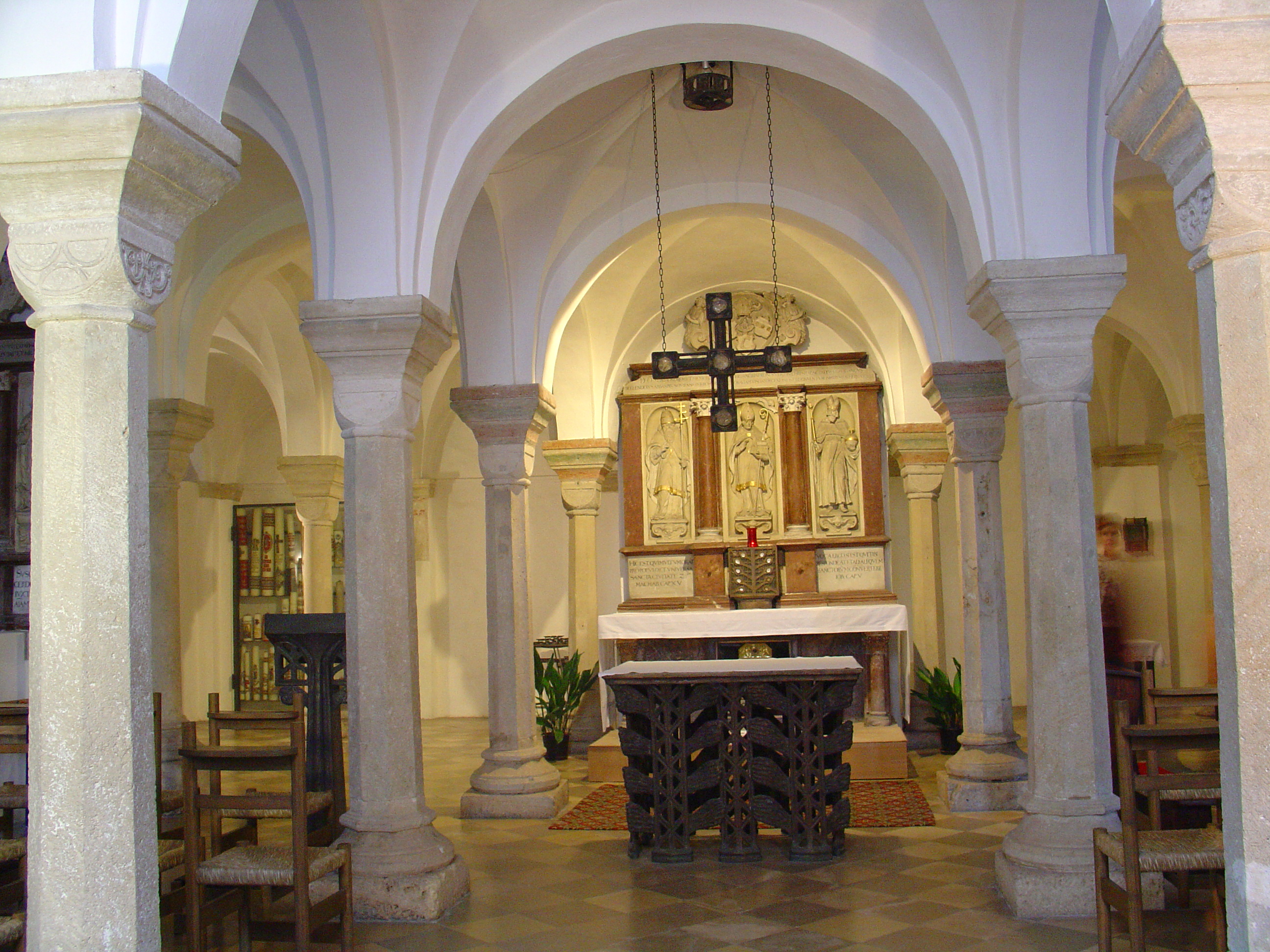 Wolfgangskrypta der Basilika St. Emmeram in Regensburg